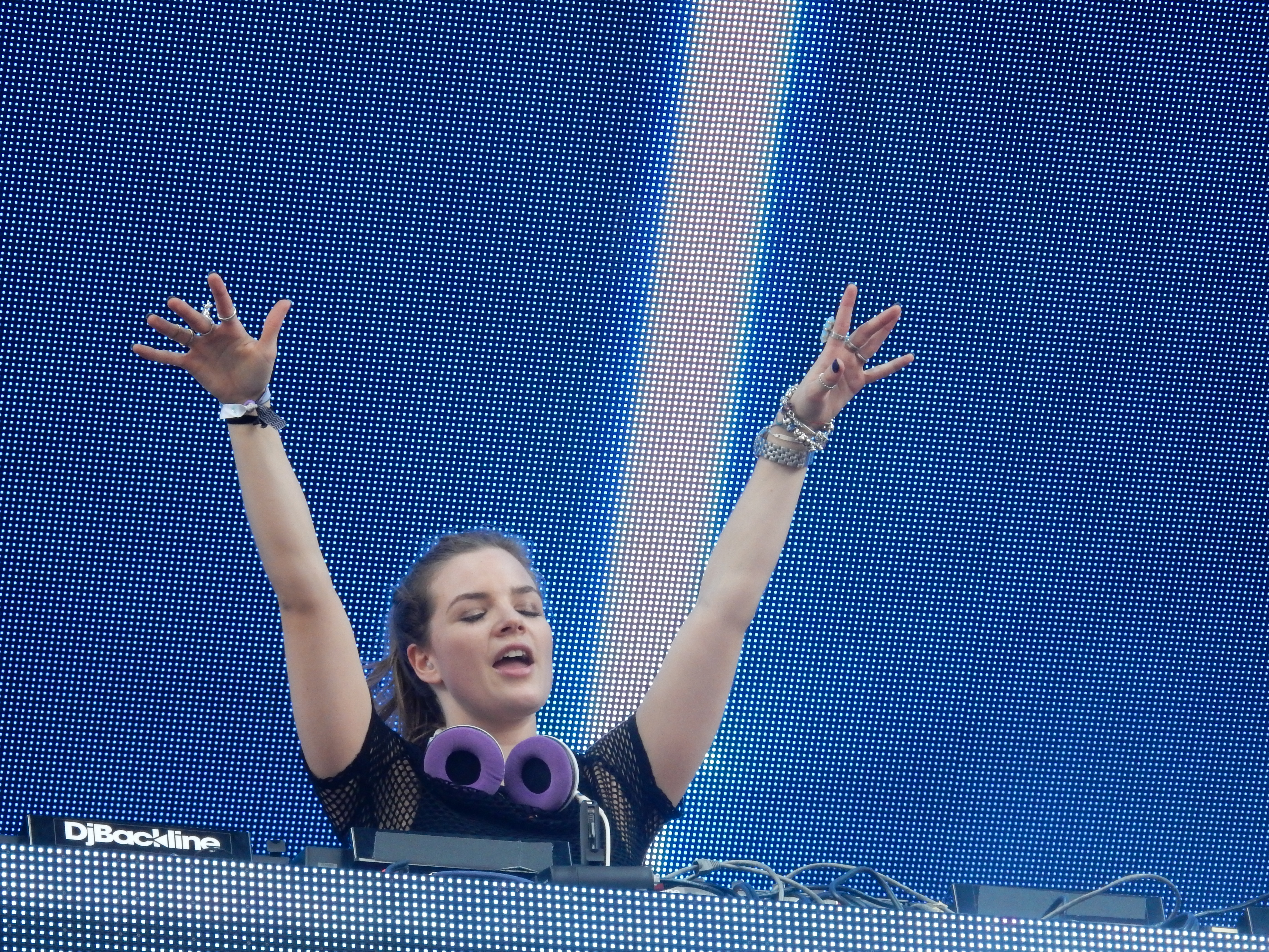 Sophie Francis at Ultra Music festival in Miami (25-03-2017)